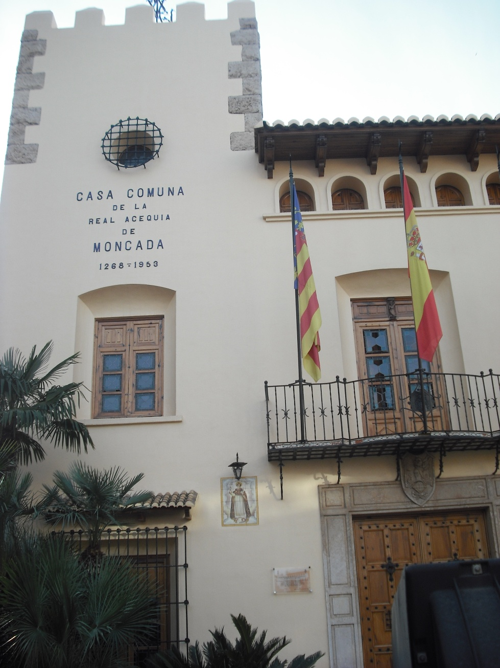 Casa comuna de la Real Acequia de Moncada. .